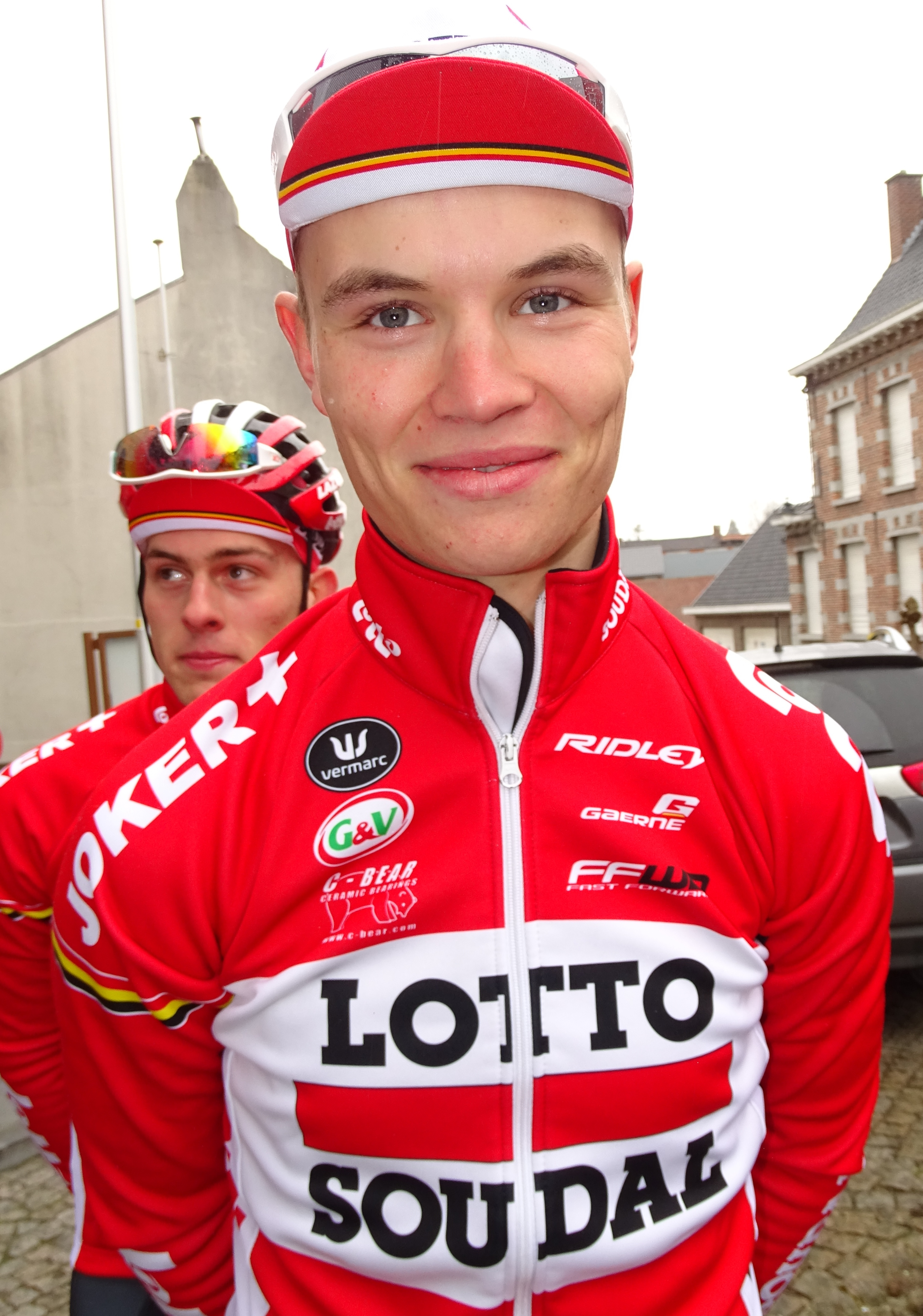 Triptyque des Monts et Châteaux 2015 Depicted person: Senne Leysen Depicted team: Lotto-Soudal U23